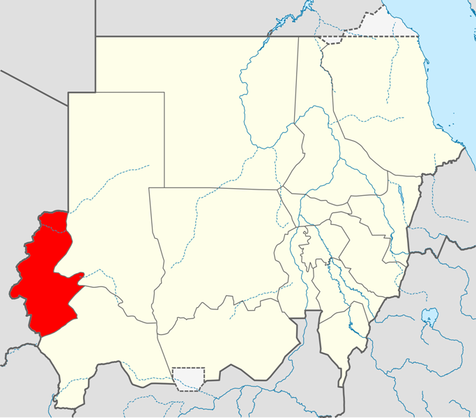 Locator map